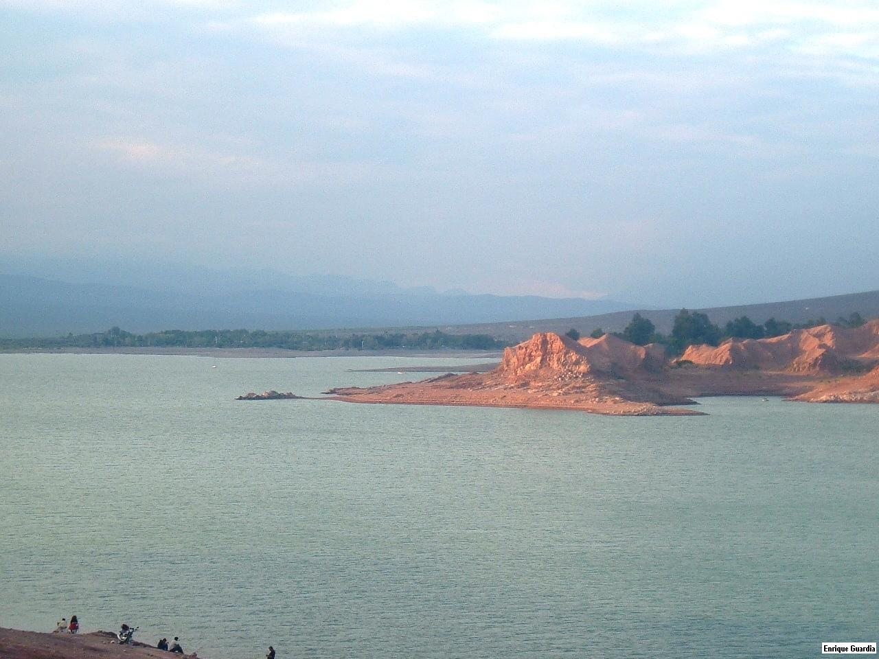 Vista del Embalse Ullum, desde el dique en la Quebrada de Ullum, provincia de San Juan, Argentina